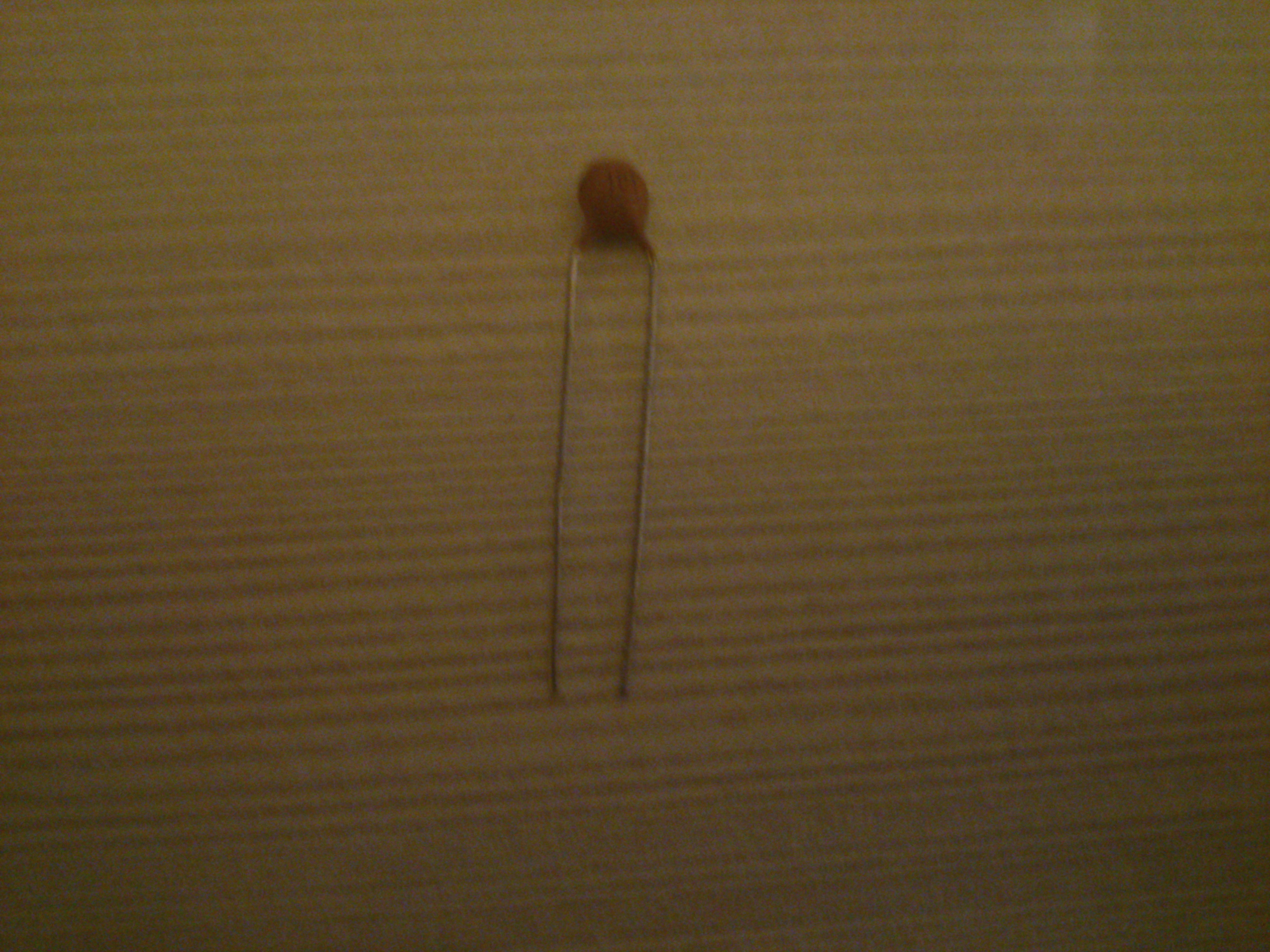 Condensador Ceramico